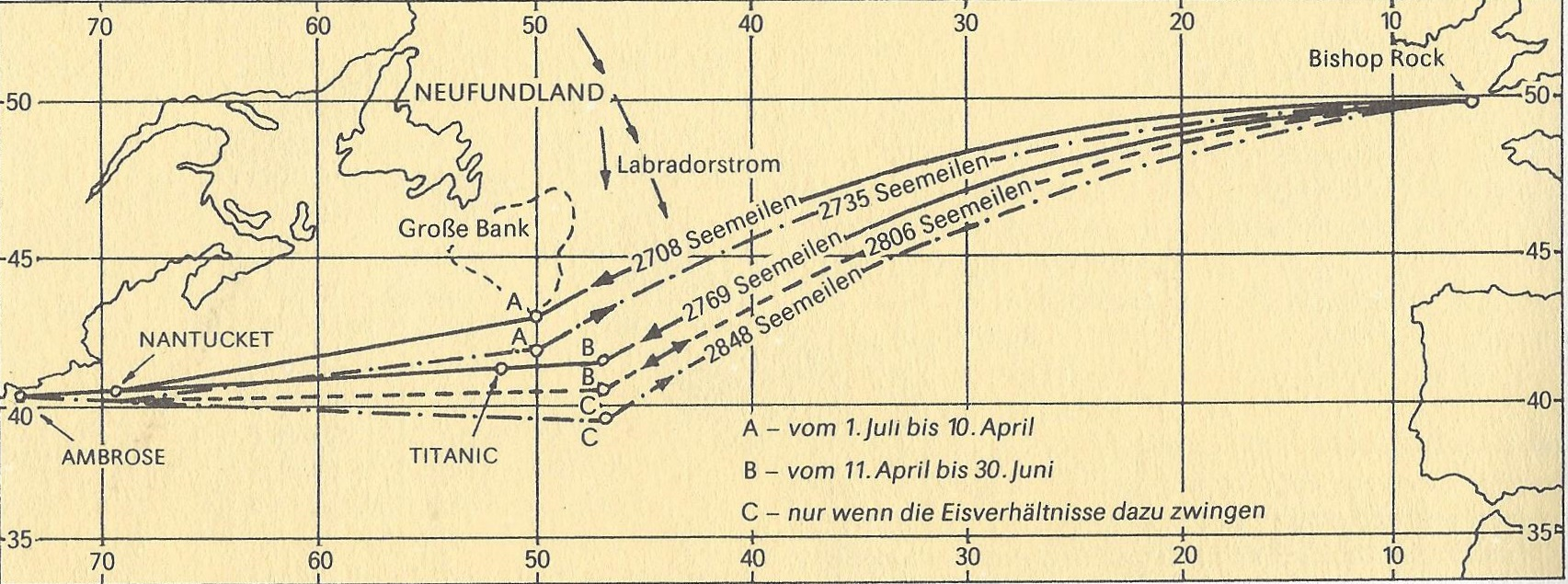 Dampferrouten auf dem Nordatlantik, nach: W. J. Urbanowicz: Transatlantyki – statki, okręty. Gdańsk 1977.